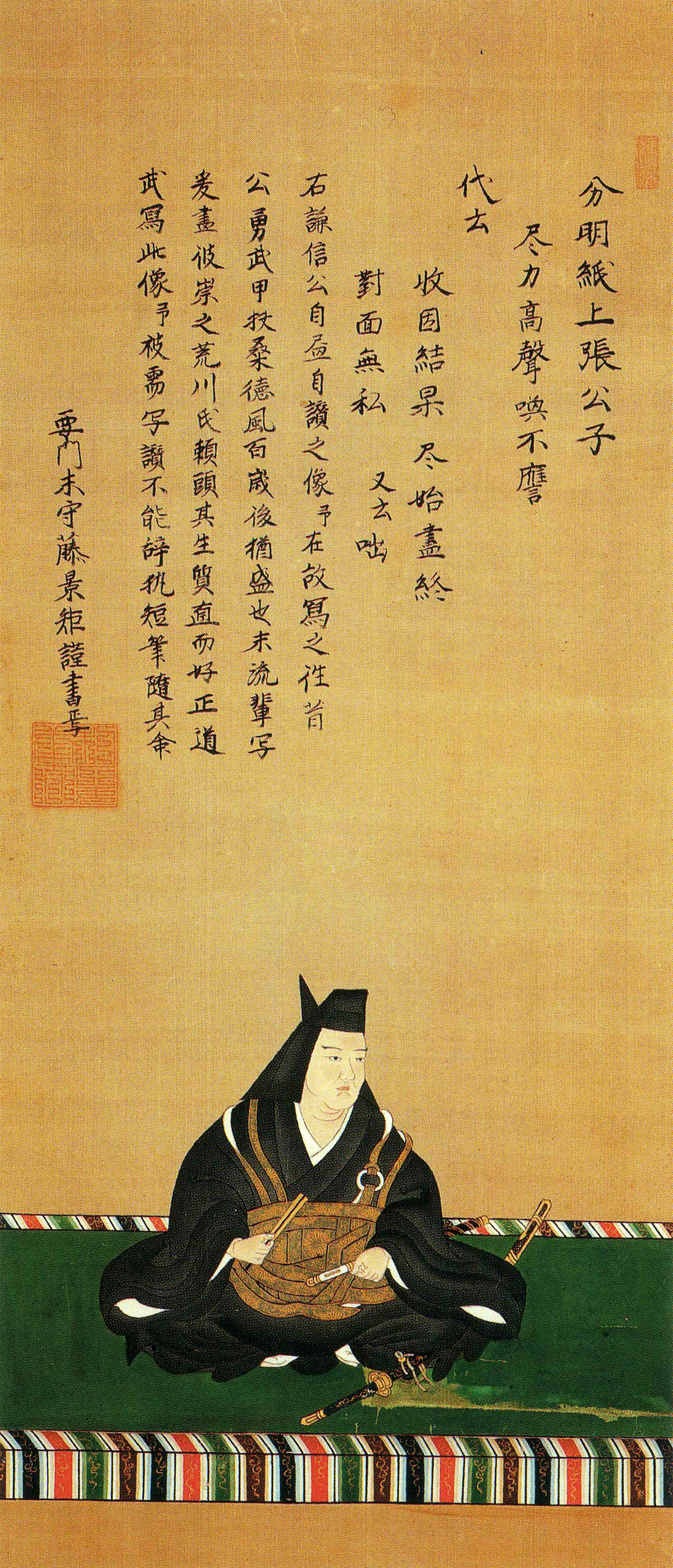 上杉謙信画像